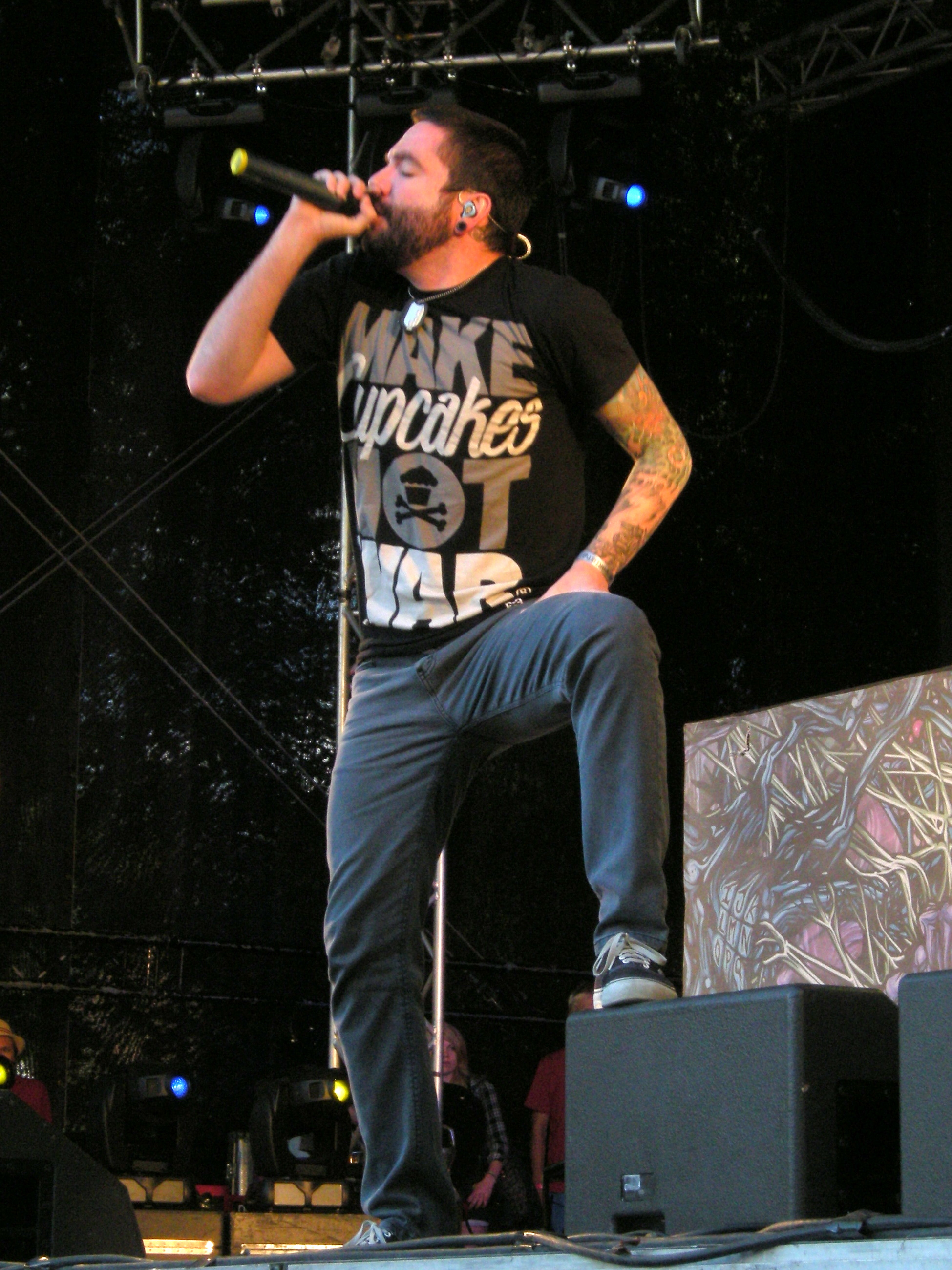 Jeremy McKinnon i A Day to Remember på Peace and Love i Borlänge 2010.